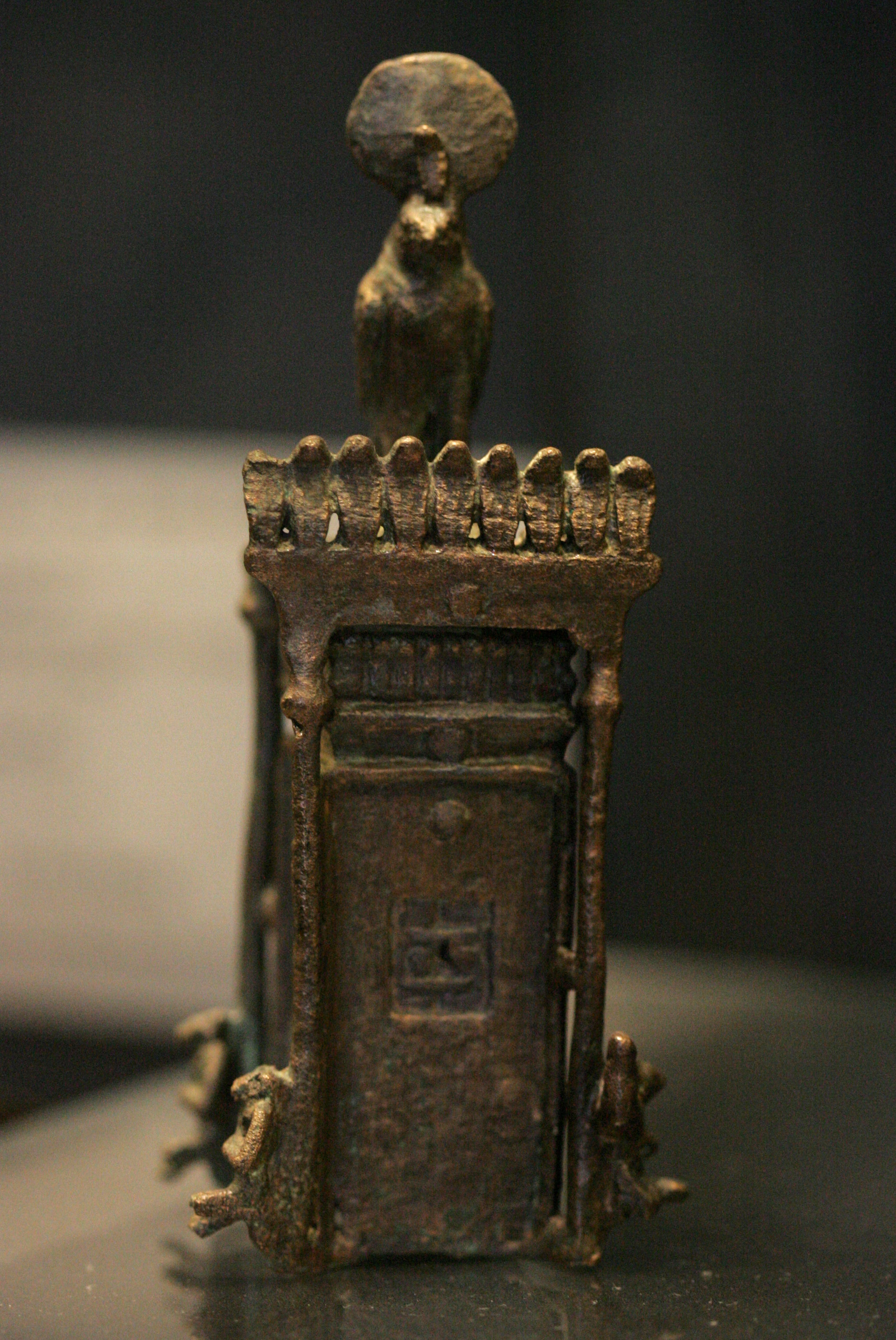 Artist Unknown artistDescription Tabernacle with falconCollection Louvre Museum (Inventory)Native nameMusée du LouvreParent institutionÉtablissement public du musée du LouvreLocationParisCoordinates48° 51′ 37.42″ N, 2° 20′ 15.36″ E Established1793Web page control : Q19675 VIAF: 257711507 ISNI: 0000 0001 2260 177X ULAN: 500125189 LCCN: n80020283 NLA: 35912436 WorldCat institution QS:P195,Q19675Current location Sully Rez-de-chaussée Matériaux et techniques Salle 7Accession number E10658References Louvre.frSource/Photographer Rama Tabernacle with falcon